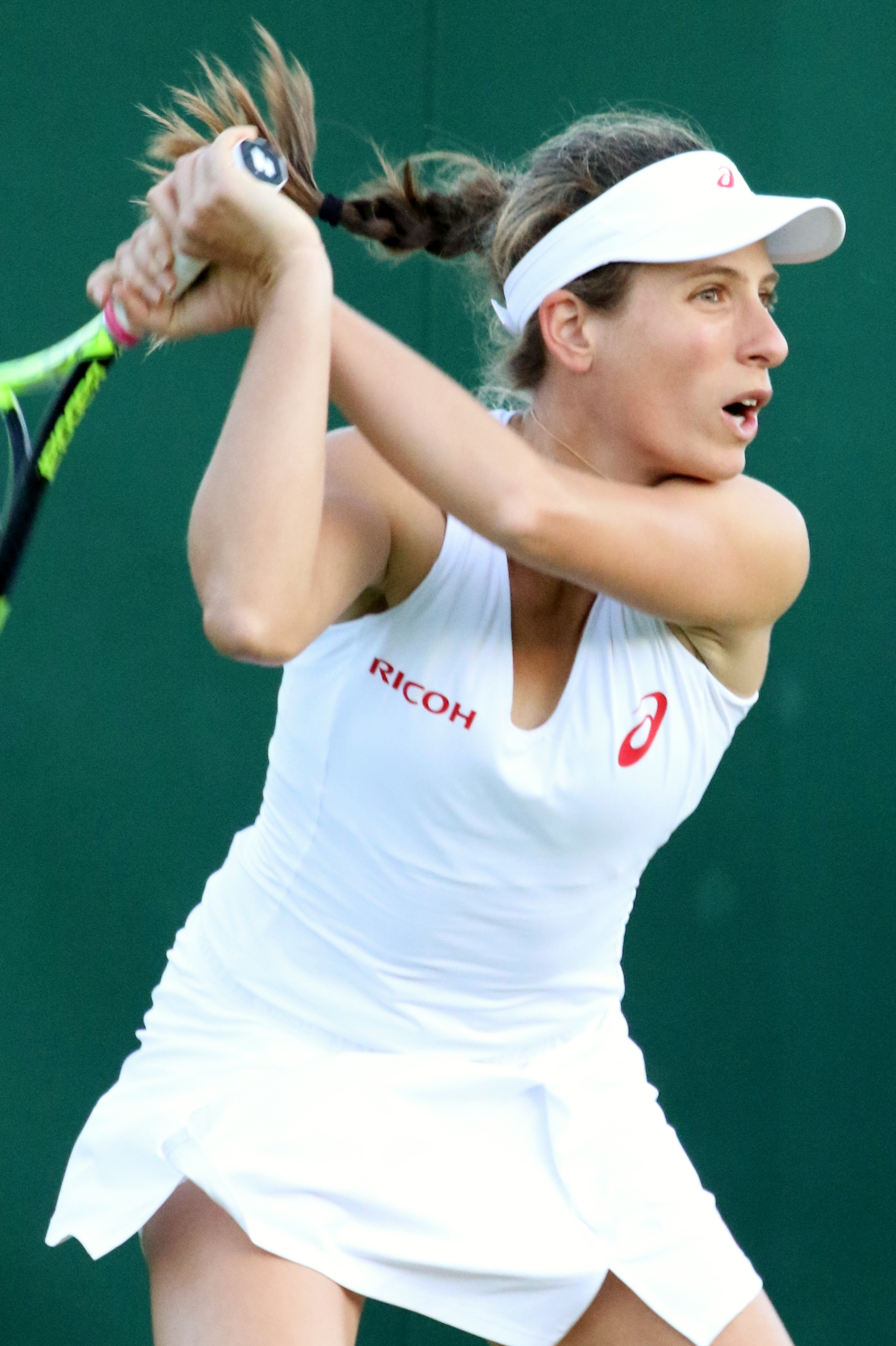 Konta WM16 (8)